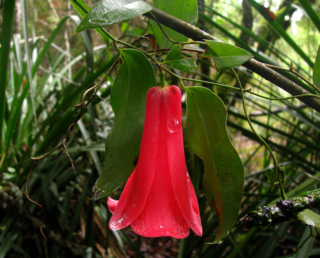 Lapageria rosea - Copihue